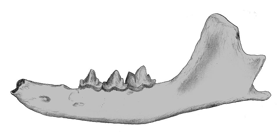 Haplogale media